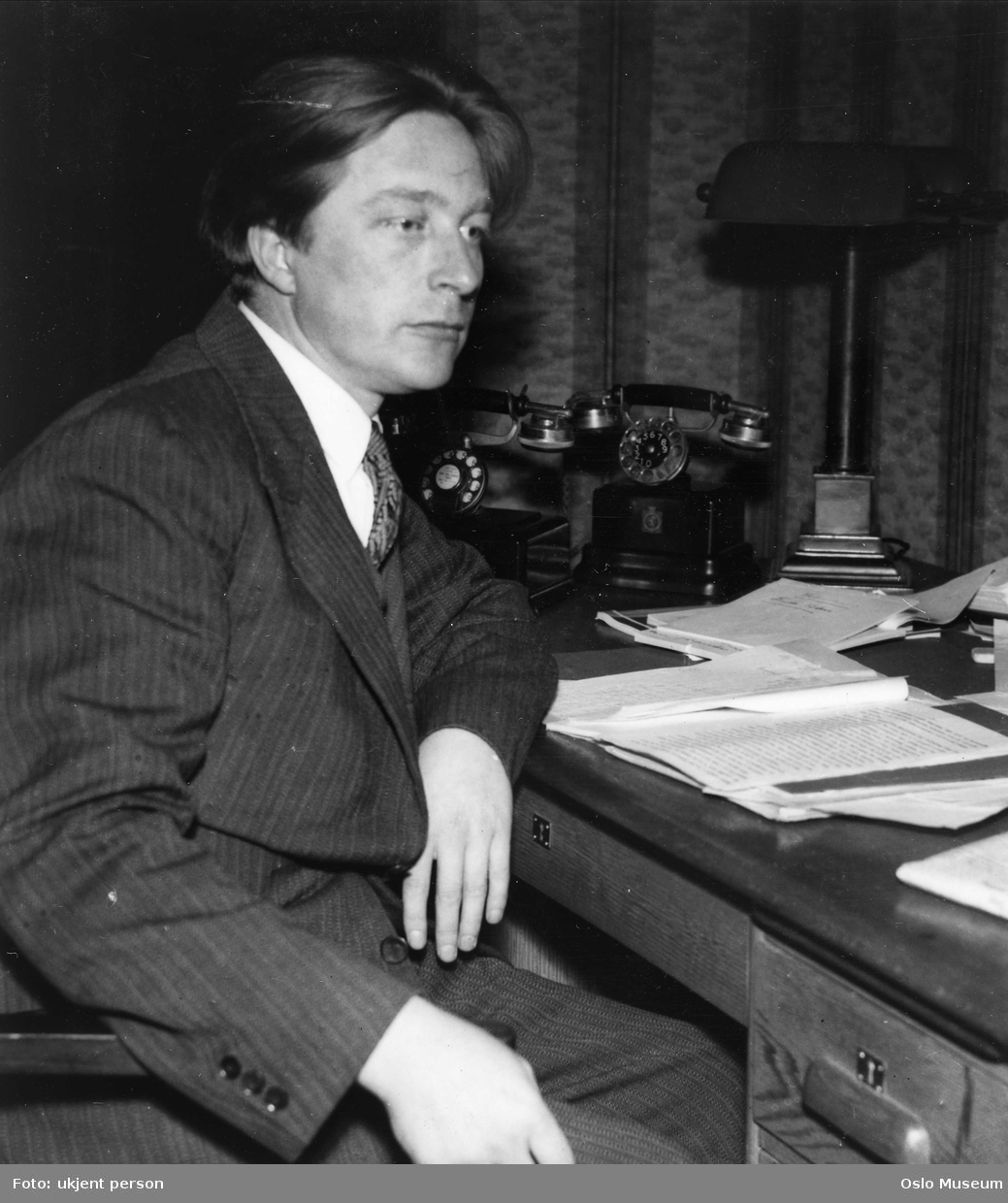 Eivind Groven. Ukjent fotograf (ca. 1935). Fra Byhistorisk samling hos Oslo Museum.